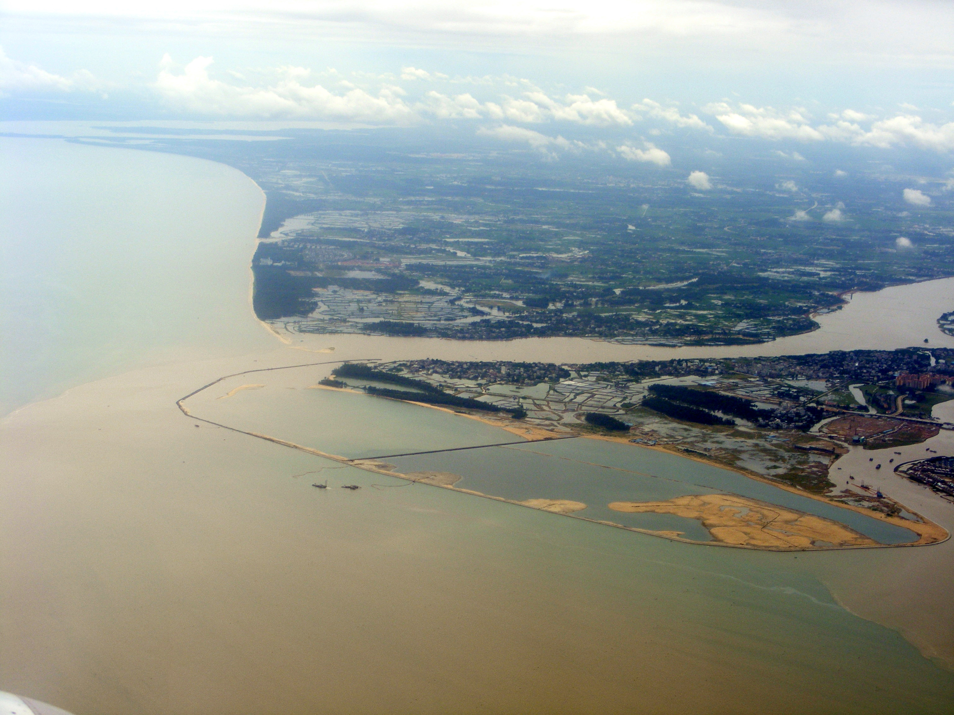 Haikou Meilan